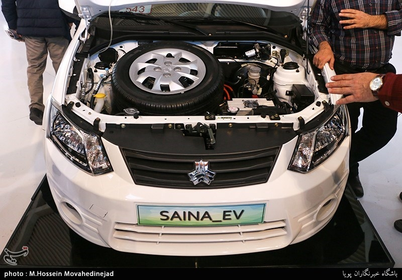 سومین نمایشگاه بین‌المللی خودروی تهران - ۲۱ دی ۱۳۹۷